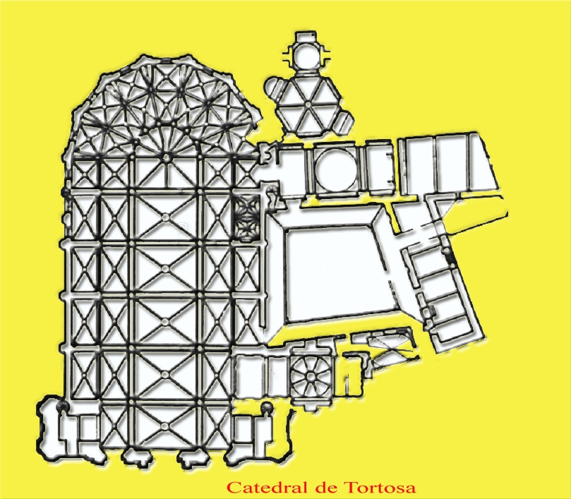 La catedral de Santa María de Tortosa, es sede de la diócesis de Tortosa en la provincia de Tarragona